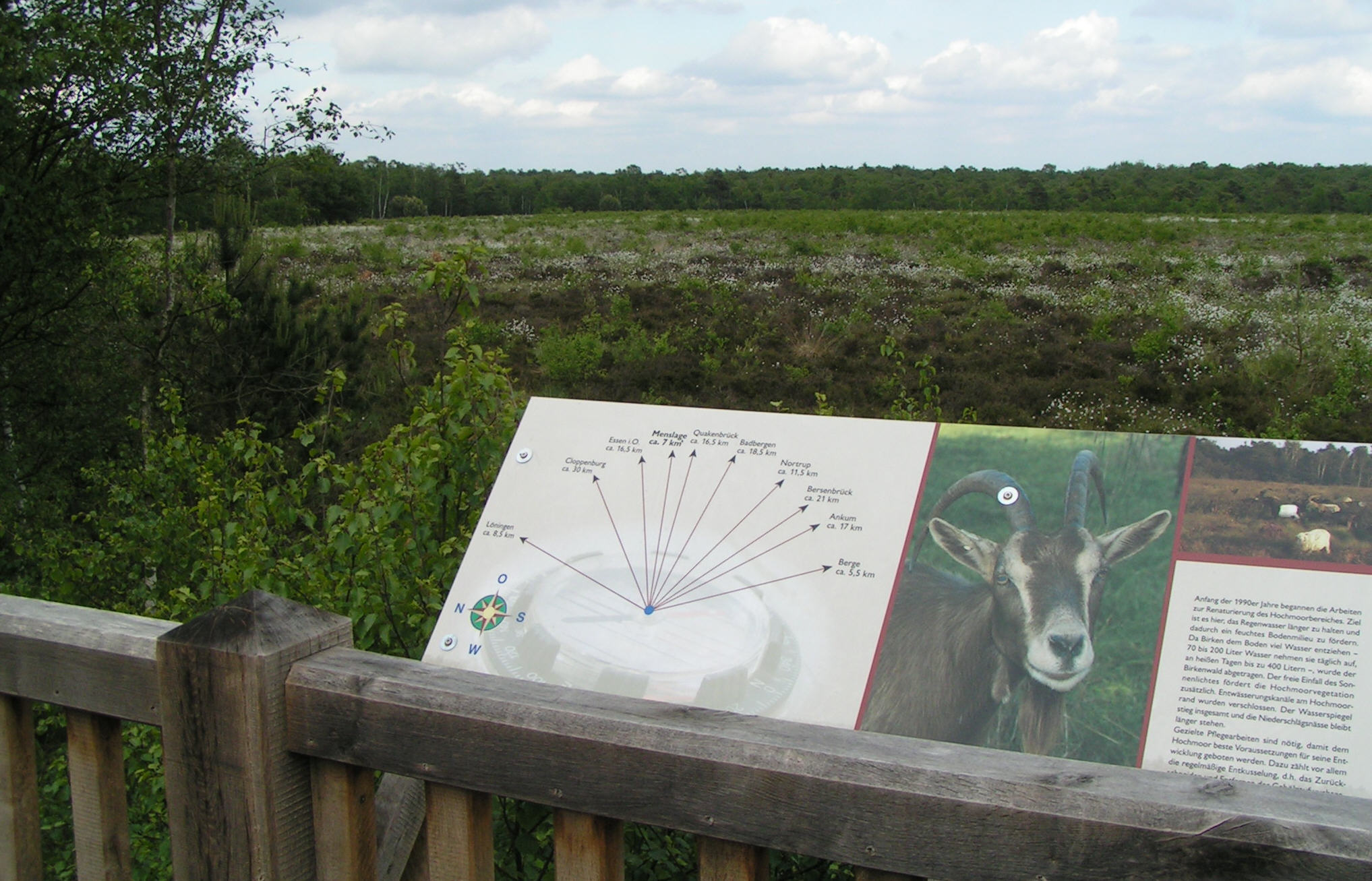 Moorlehrpfad im NSG Hahlener Moor (Landkreis Osnabrück)